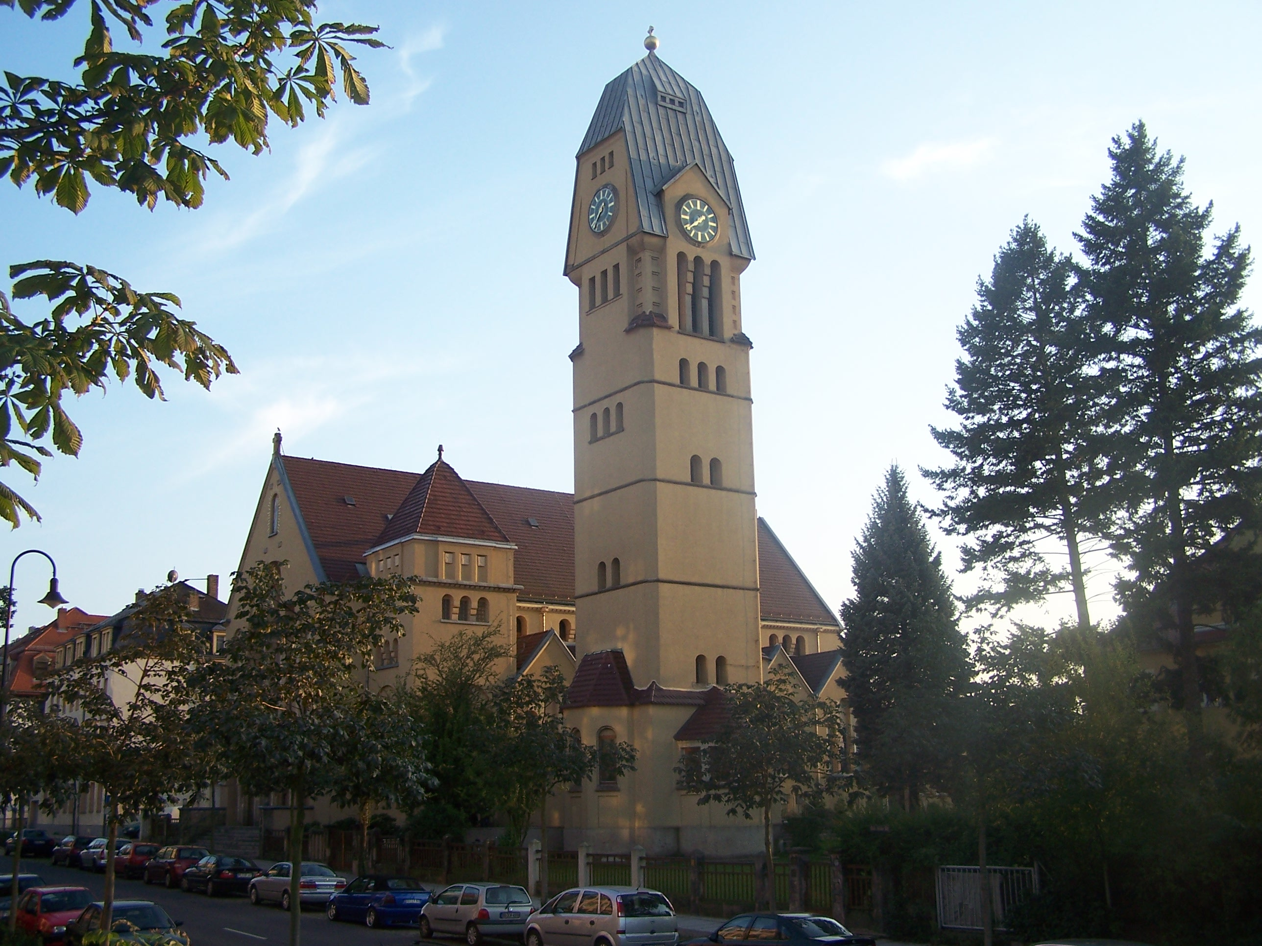 katholische St. Josephskirche in Dresden-Pieschen